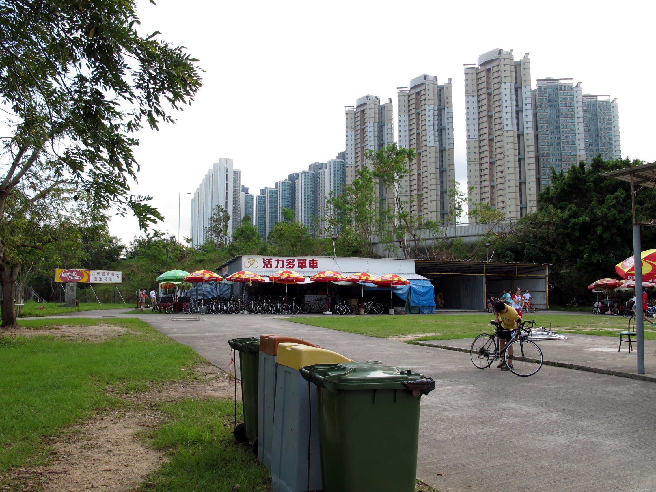 Tai Shui Hang Cycle Park